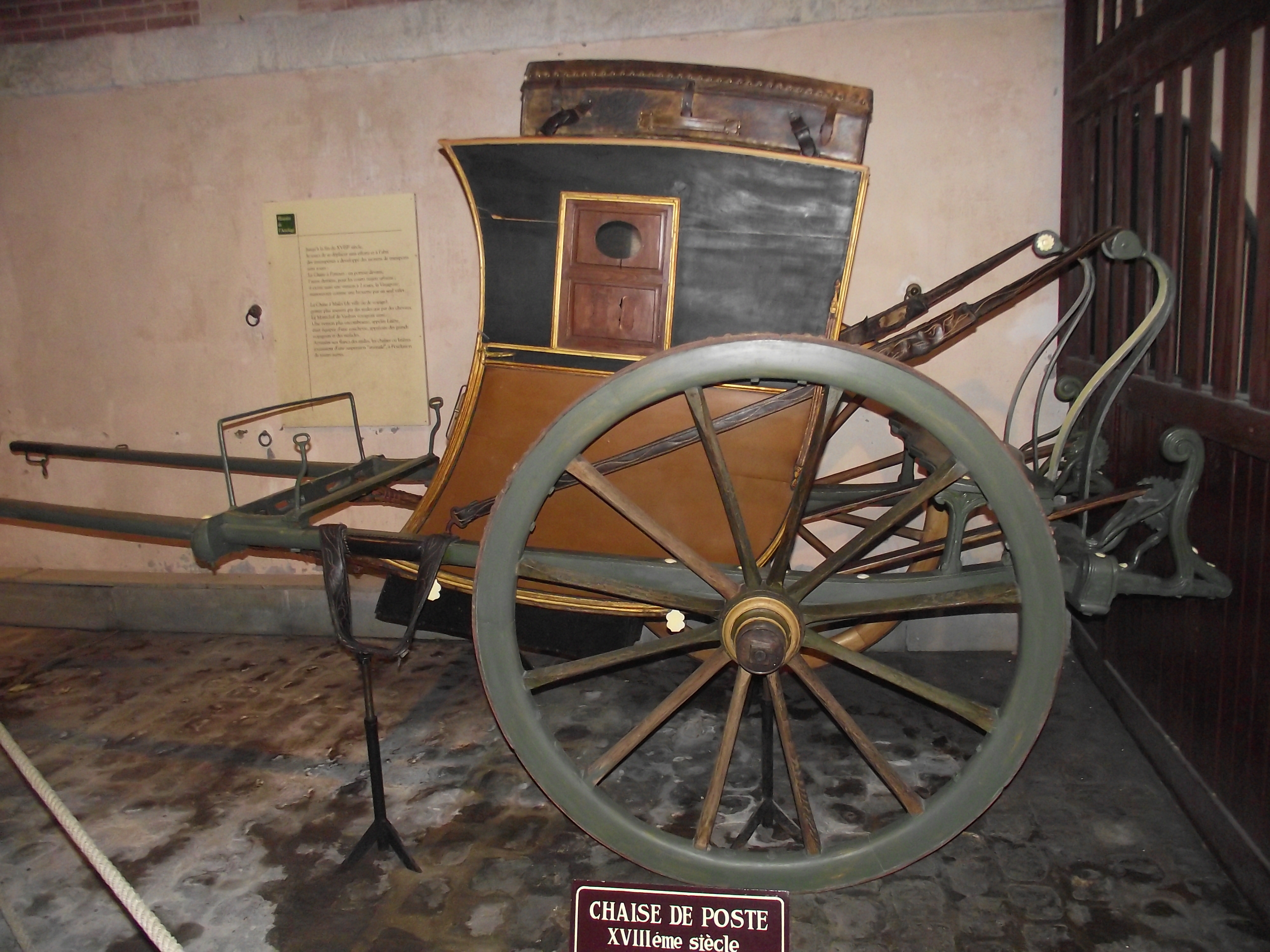 Chaise de poste au musée du château de Vaux-le-Vicomte.